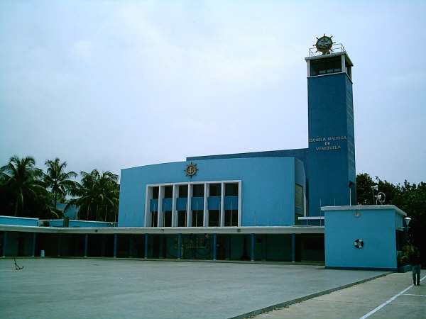 Esta imagen es una fotografía tomada al Aula Magna de la Universidad Marítima del Caribe, institución en la que curso la carrera de Ingeniería Marítima.